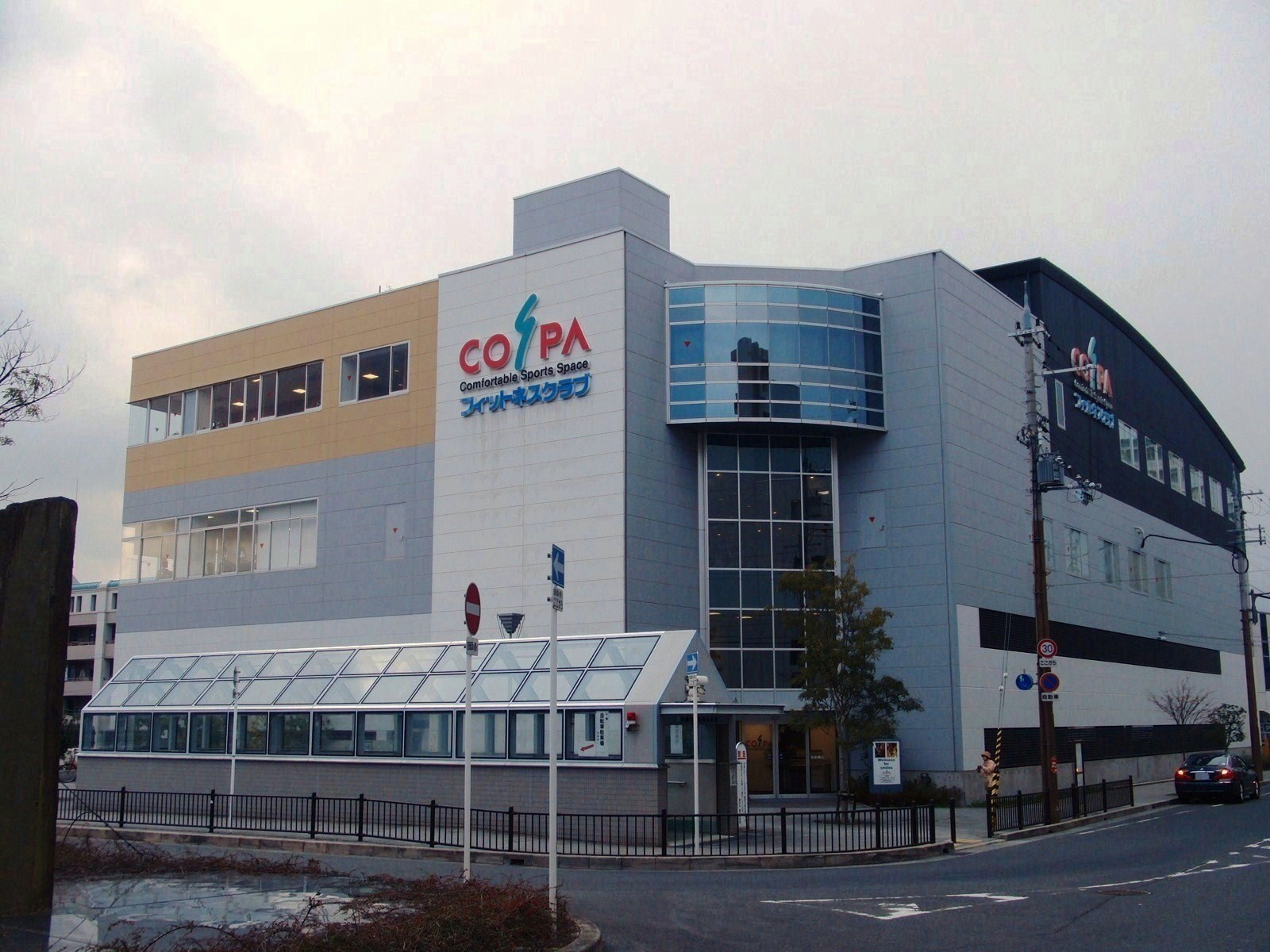 フィットネスクラブコ・ス・パ豊中少路を撮影